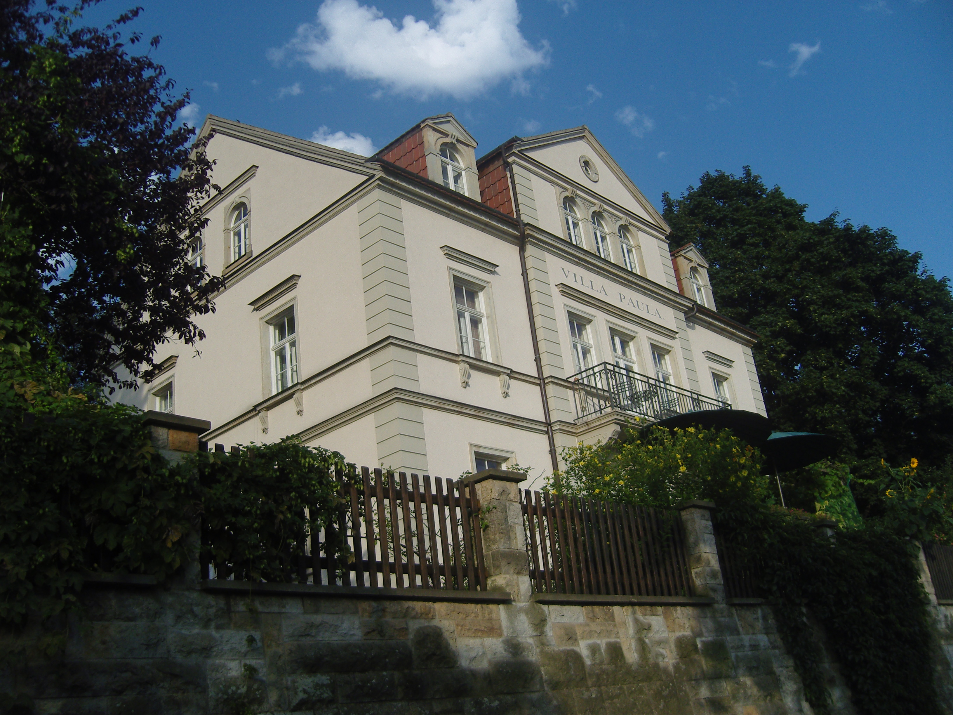 Denkmalgeschütztes Wohnhaus mir Gartentor und Gedenktafel am Körnerweg 12 in Dresden-Loschwitz; ehemaliges Wohnhaus der Hofschauspielerin Pauline Ulrich